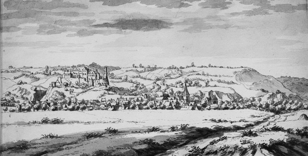 Kasteel Valkenburg: tekening van J.de Grave, 1669